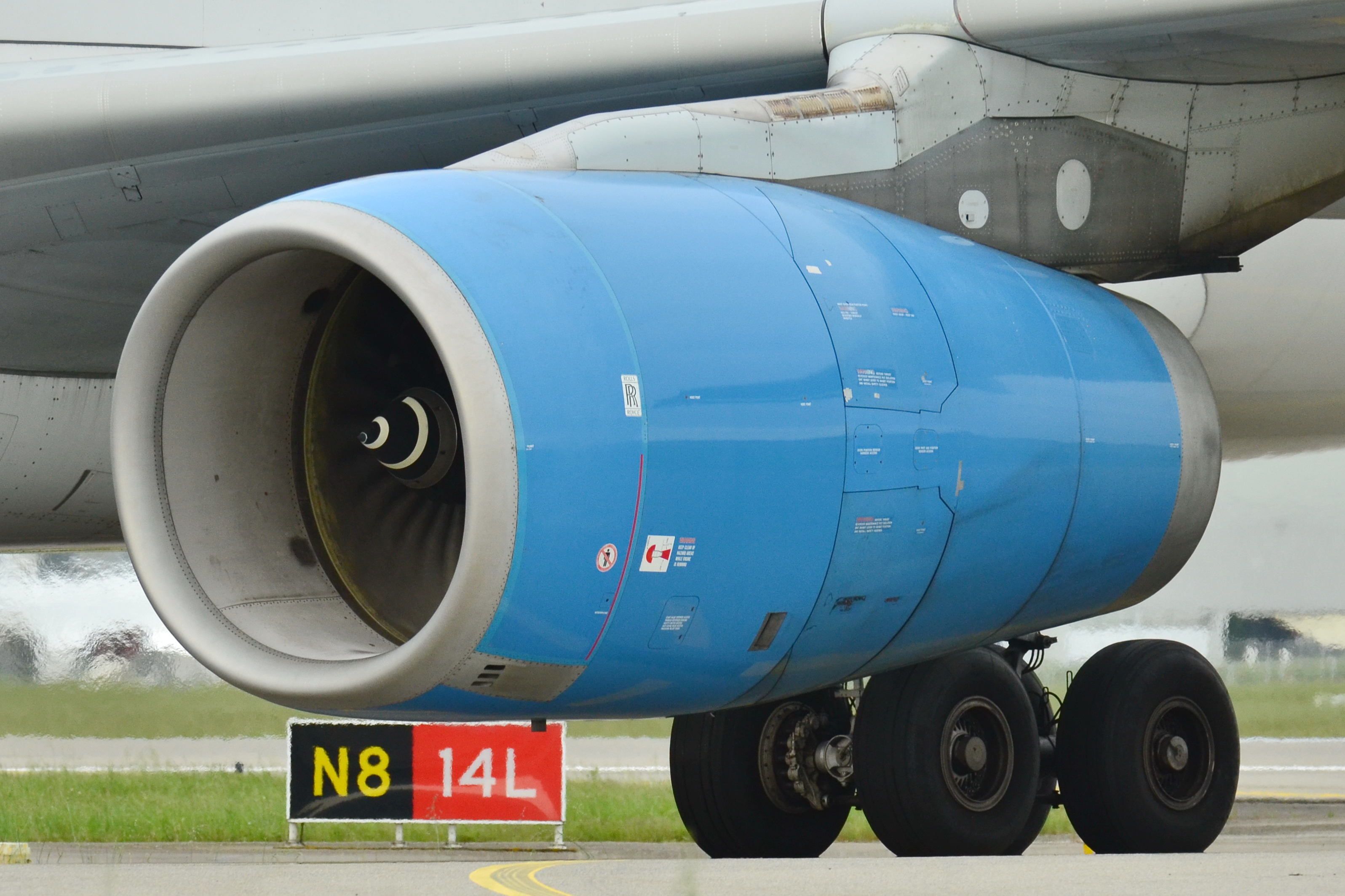 Photo prise à l'aéroport de Toulouse-Blagnac (LFBO) en France. Picture take at Toulouse-Blagnac Airport (LFBO) in France.